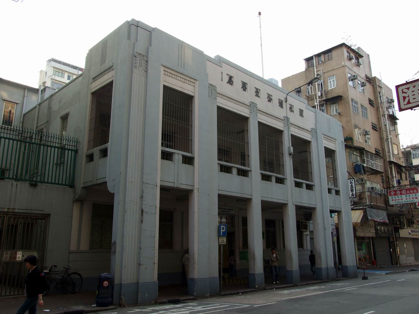 深水埗公立醫局 137 Yee Kuk Street, Sham Shui Po